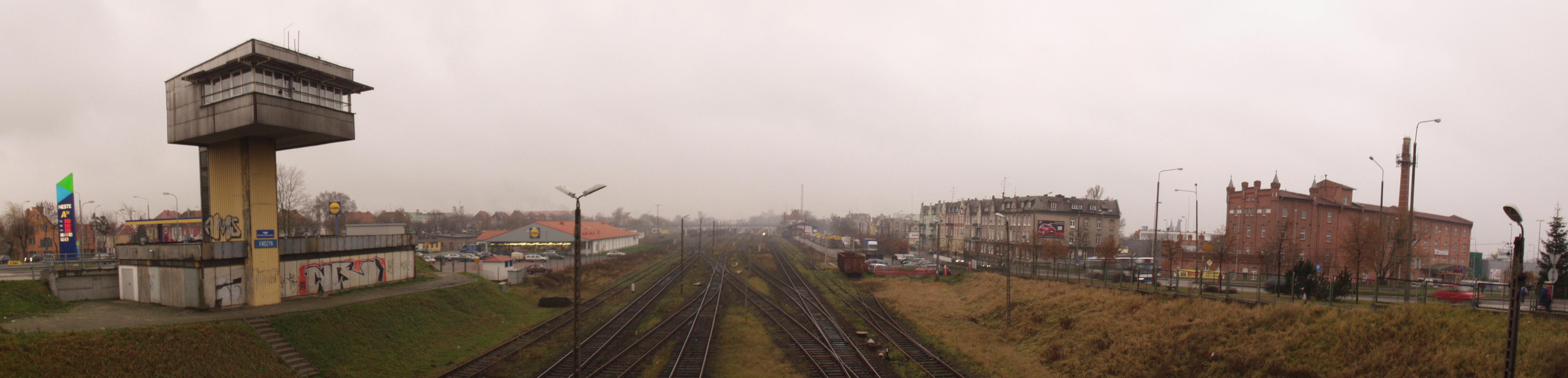 Panorama na Kwidzyn z wiaduktu